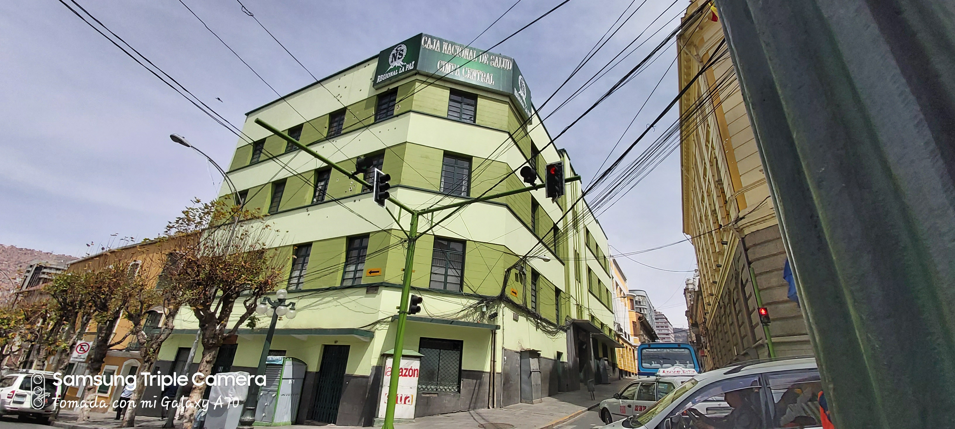 Caja Nacional de Salud This medium shows the protected monument with the number L/00-124 in Bolivia.